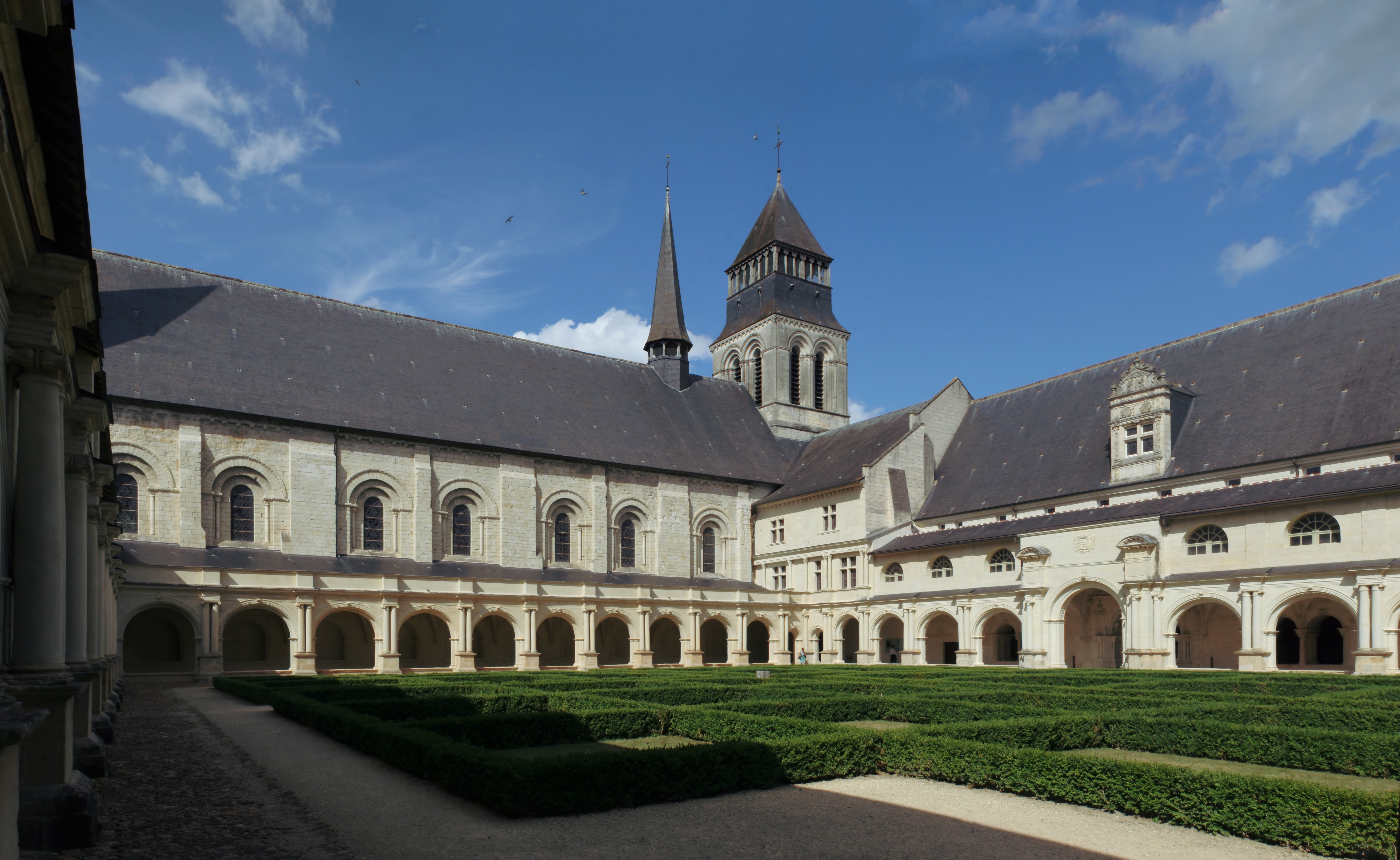 Cloître de Grand-Moûtier et abbatiale, à l'abbaye royale de Fontevraud.